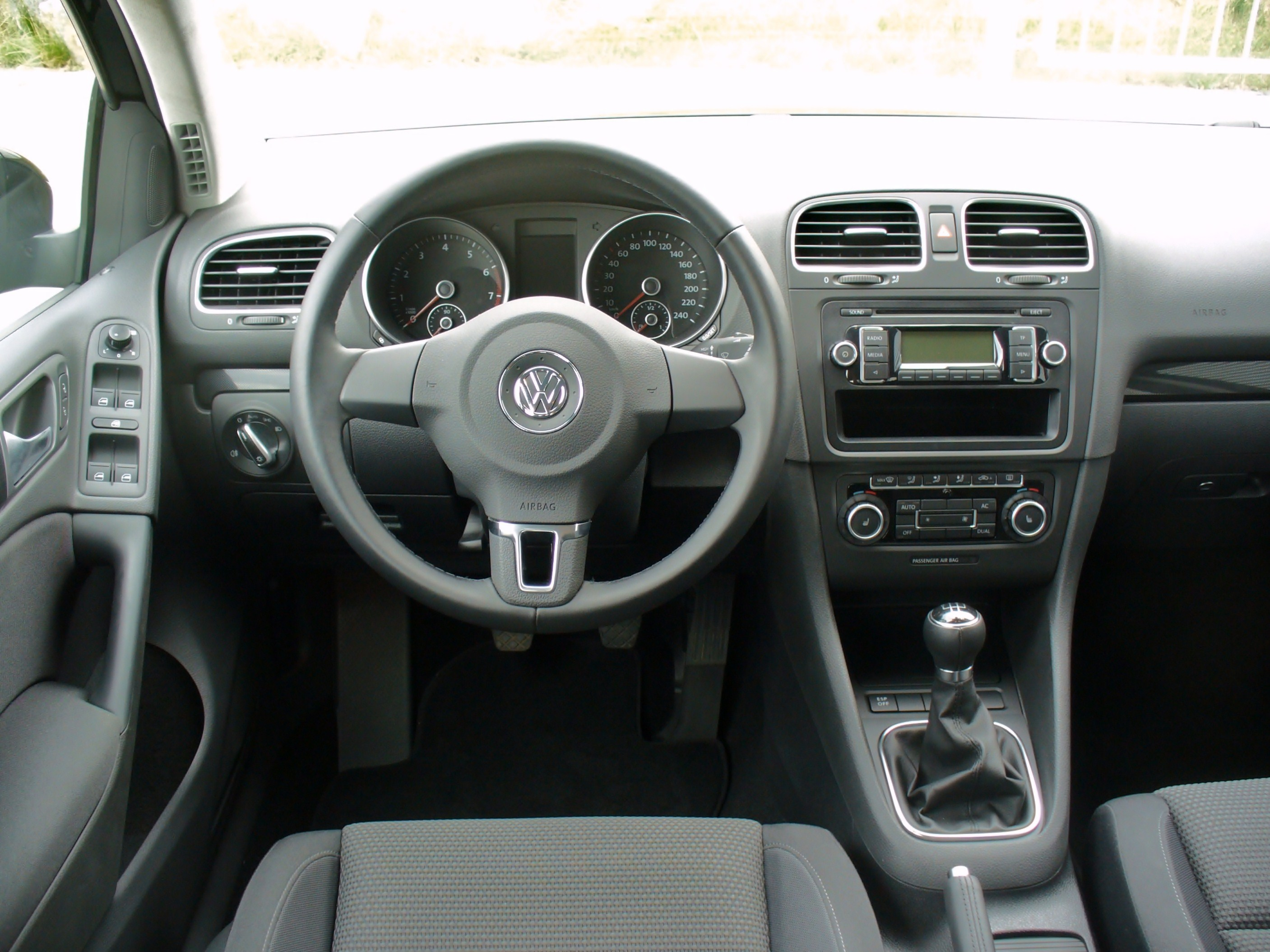 VW Golf VI